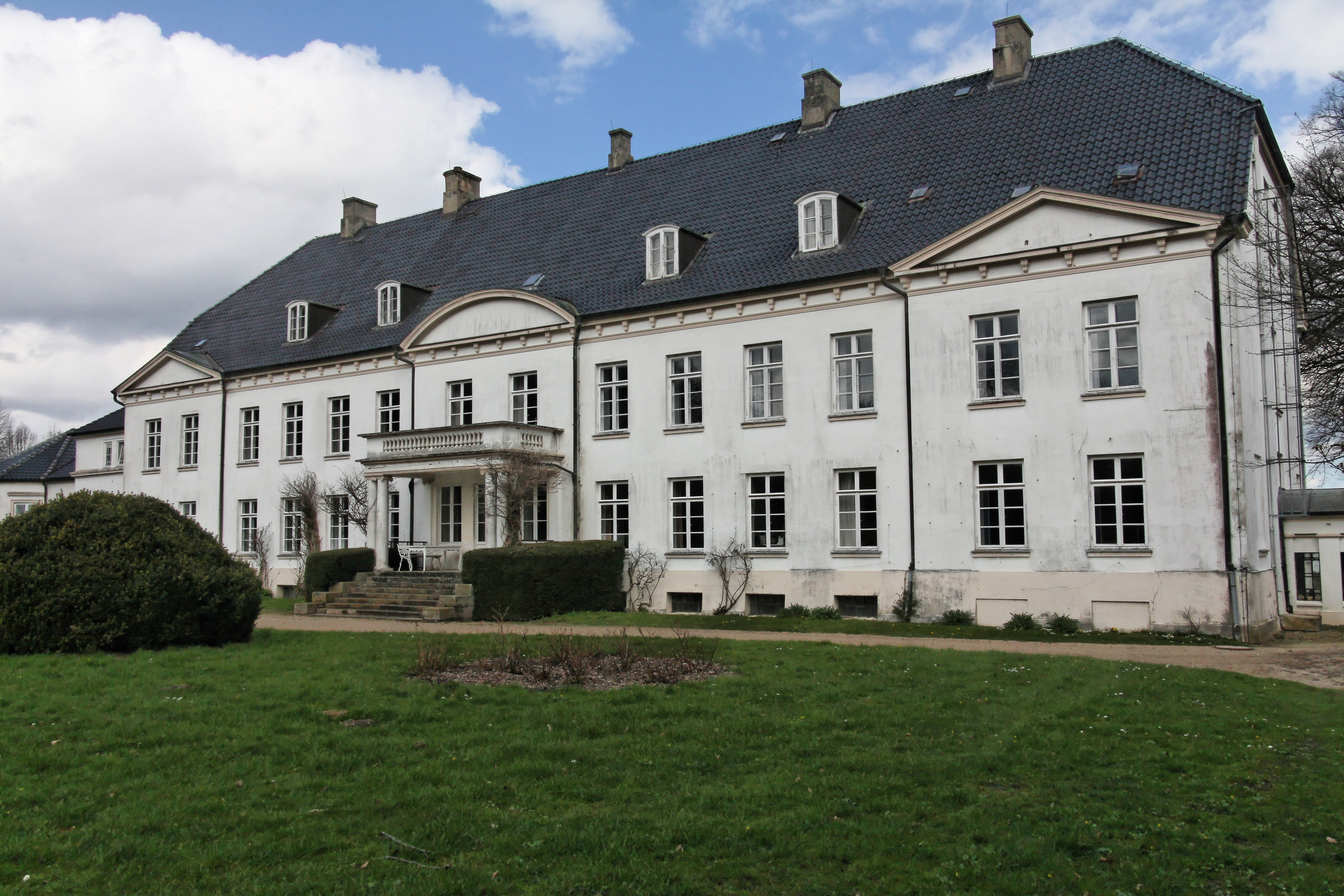 Güby, Louisenlund, Rückansicht